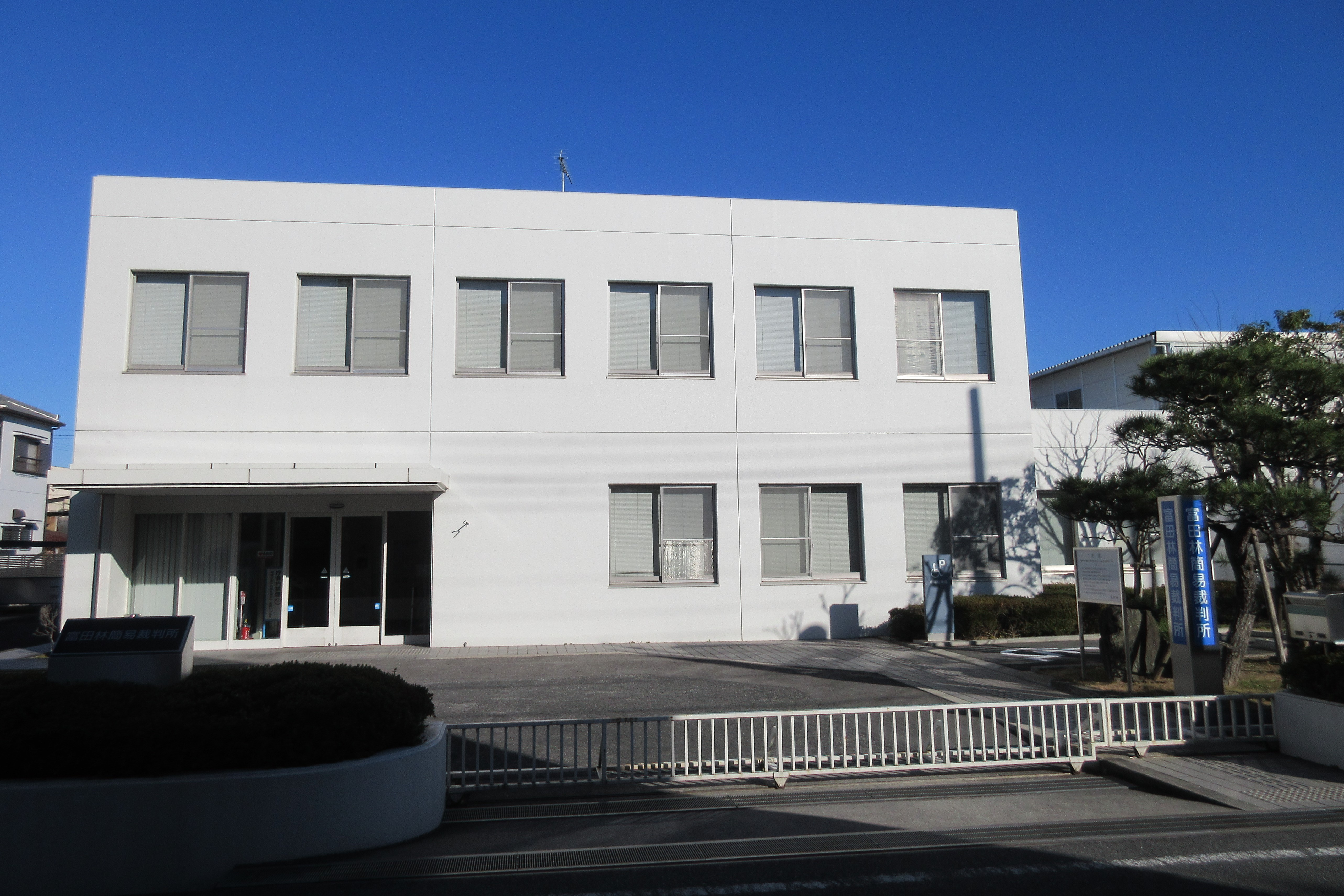 富田林簡易裁判所